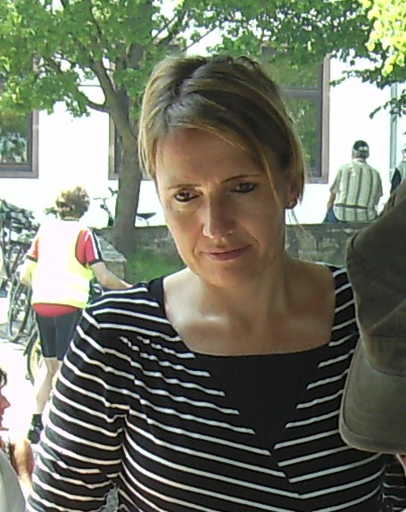 Ehemalige Umweltministerin des Saarlandes (bis Januar 2012) Simone Peter